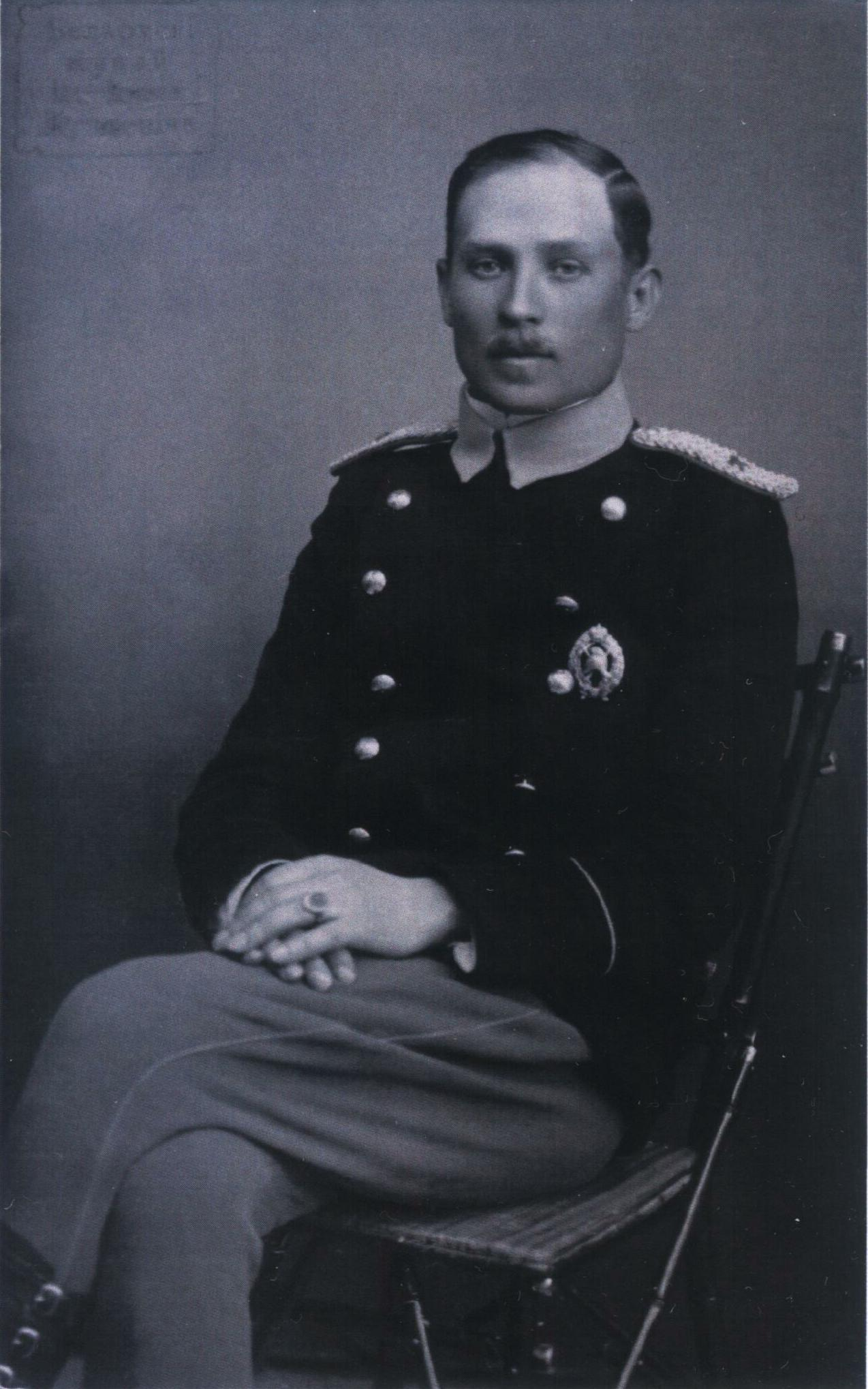 Daminik Siamaszka, białoruski działacz